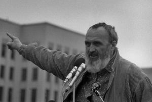 Першы старшыня БНП(НПГБ) Іван Юргевіч